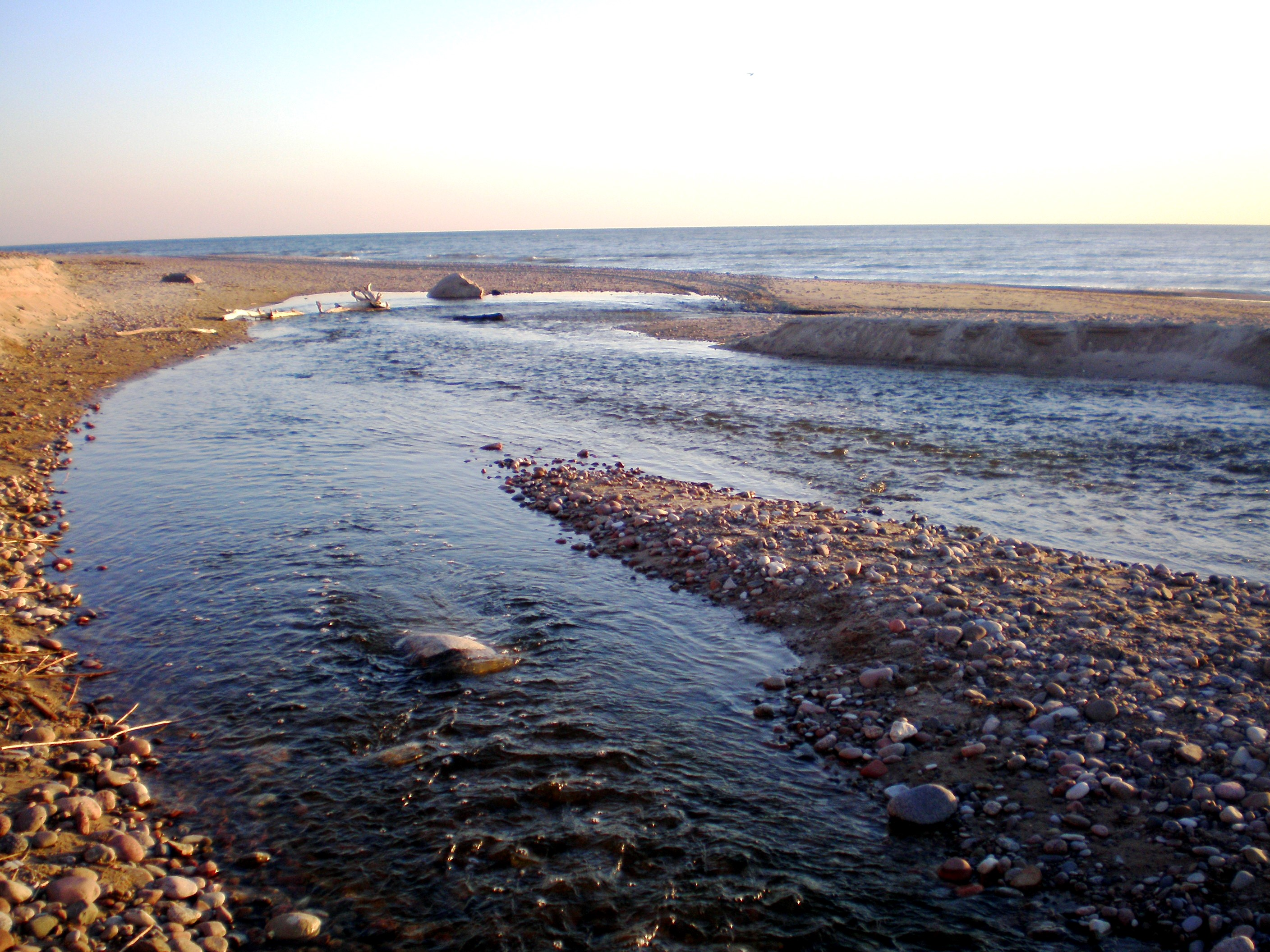 Rikinės upelis šalia žiočių, Klaipėdos raj.